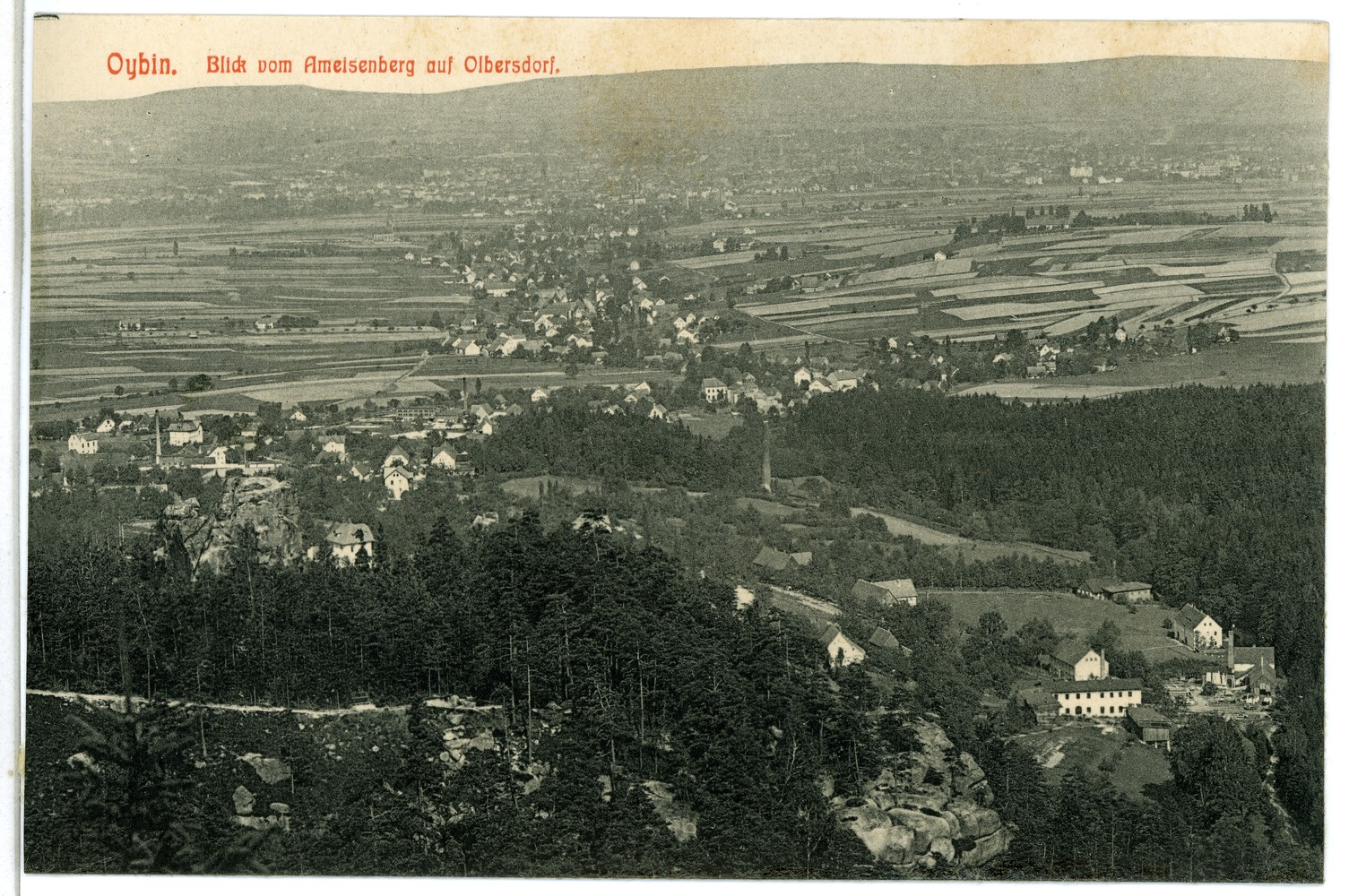 Oybin; Blick vom Ameisenberg auf Olbersdorf This postcard is from publisher Brück & Sohn in Meißen ( postcard has a unique number 05837 and is available in a higher resolution at the publisher. This images was uploaded in a cooperation project between Wikipedians and the publisher.